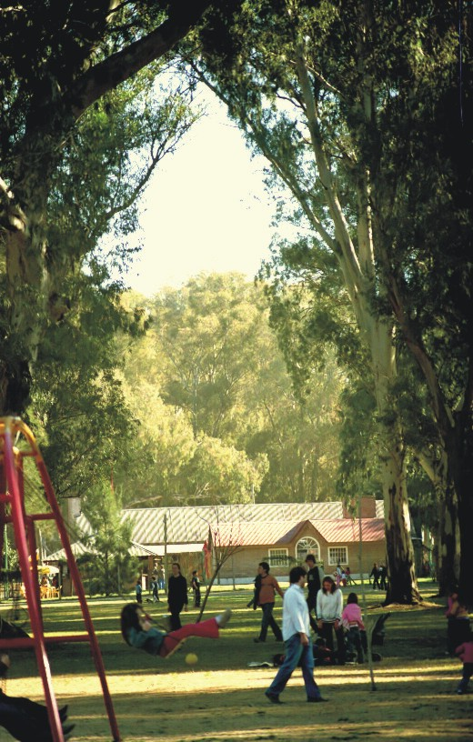 Zona central del Parque Municipal Borchex, en Junín, Argentina. (Autor: Germán Ramos).